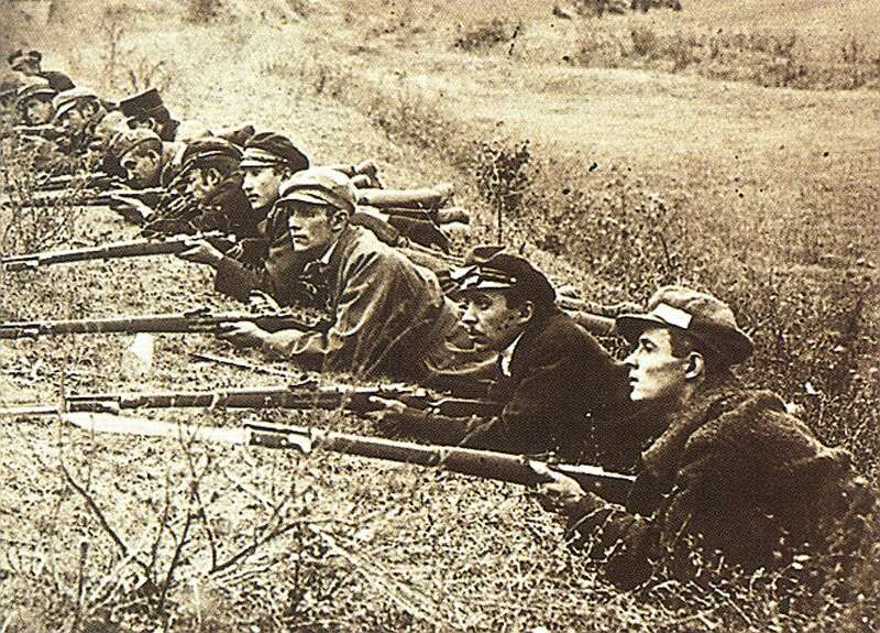 Egyetemisták a budaörsi csatában